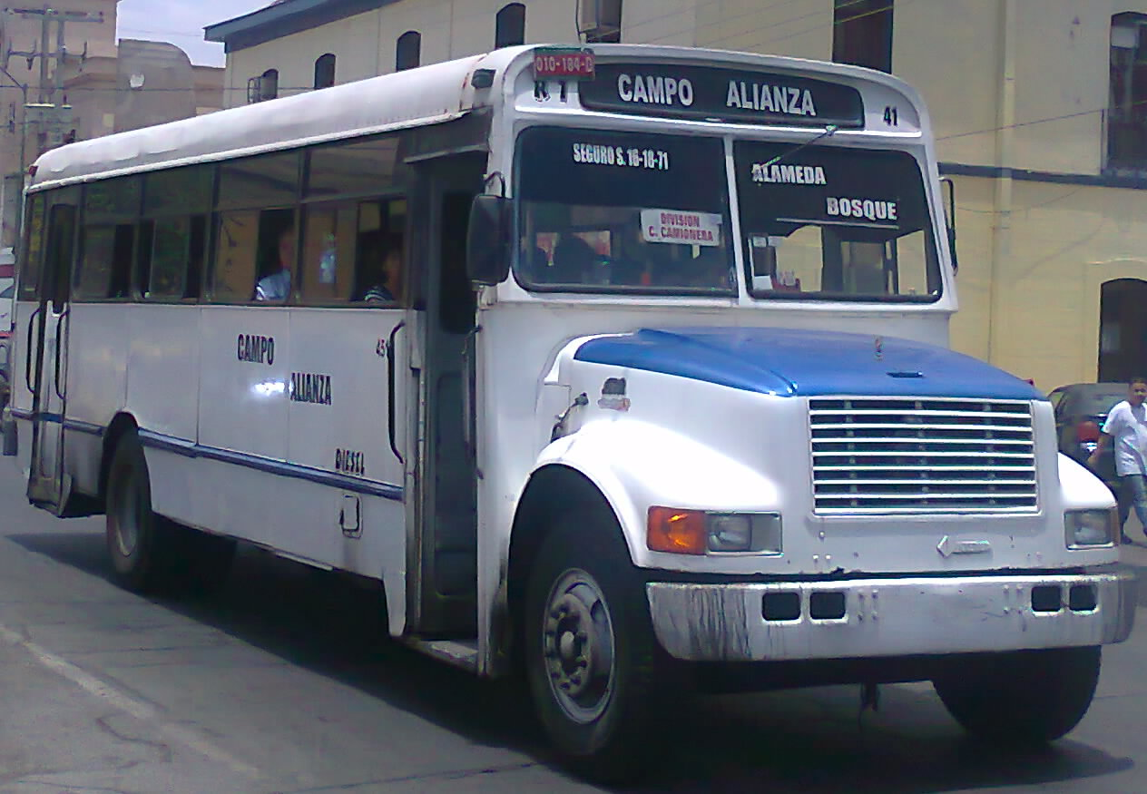 Autobús Campo Alianza, número económico 41.